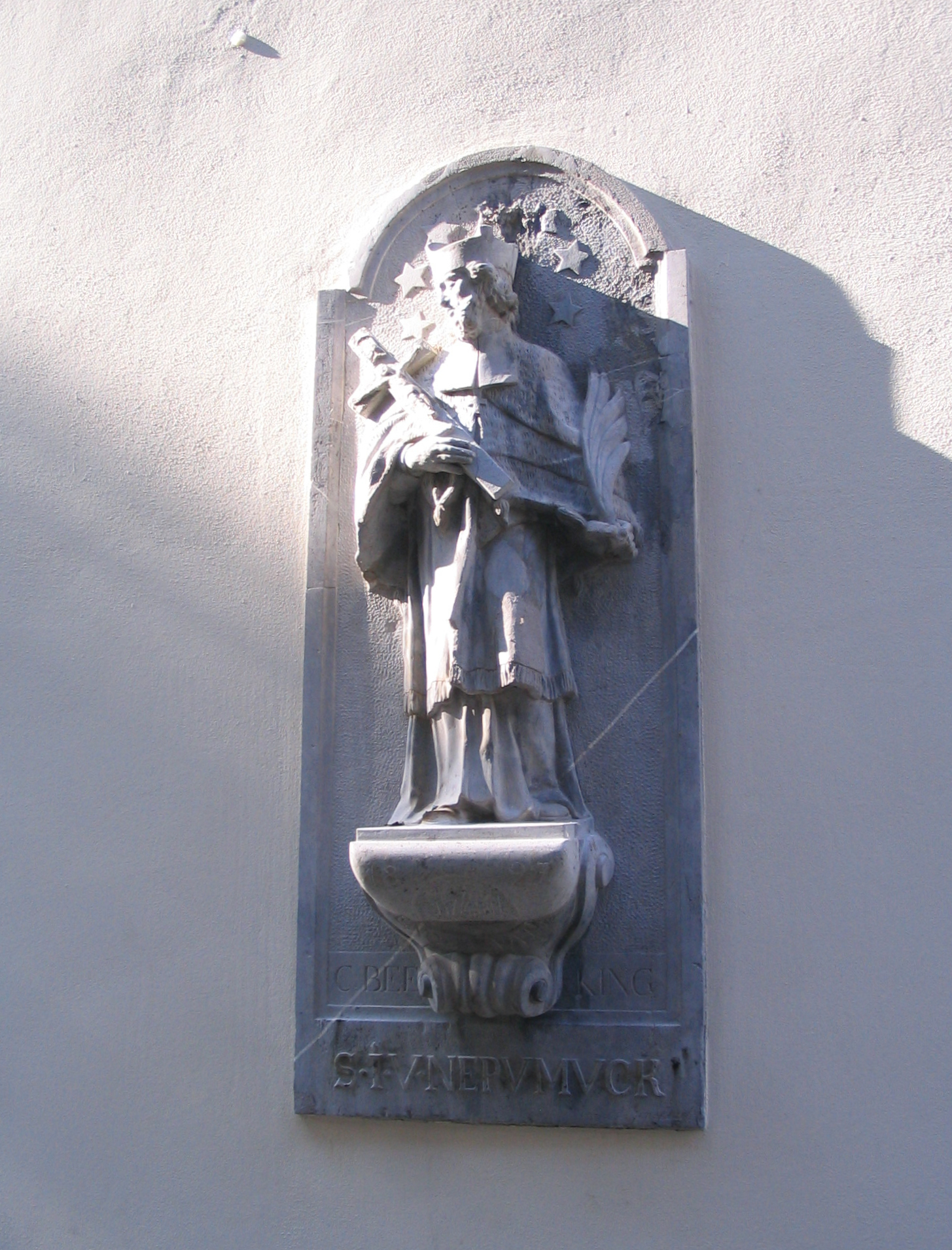 Johannes von Nepomuk, am Grupellohaus, Düsseldorf, Zollstraße. Das Relief an der Zollstraße, Ecke Marktplatz, mit der Inschrift (übersetzt) „Heiliger Johannes von Nepomuk, 1741, renoviert 1827, Christian Beeking, Bildhauer G. Lode, Senior“ stammt von dem früheren Hof des Hauses Zollstraße 9. Beeking war der Besitzer des damaligen Hauses „Zu den drei Reichskronen“, Marktplatz 5. Das Nachbarhaus 5 a hieß “Zum Heiligen Nepomuk”. (Hans Maes (Hrsg.), Alfons Houben unter Mitarbeit Hatto Küffner, Edmund Spohr: Düsseldorf in Stein und Bronze. 2. Auflage, Triltsch Verlag, Düsseldorf, 1984, ISBN 3-7998-0018-2